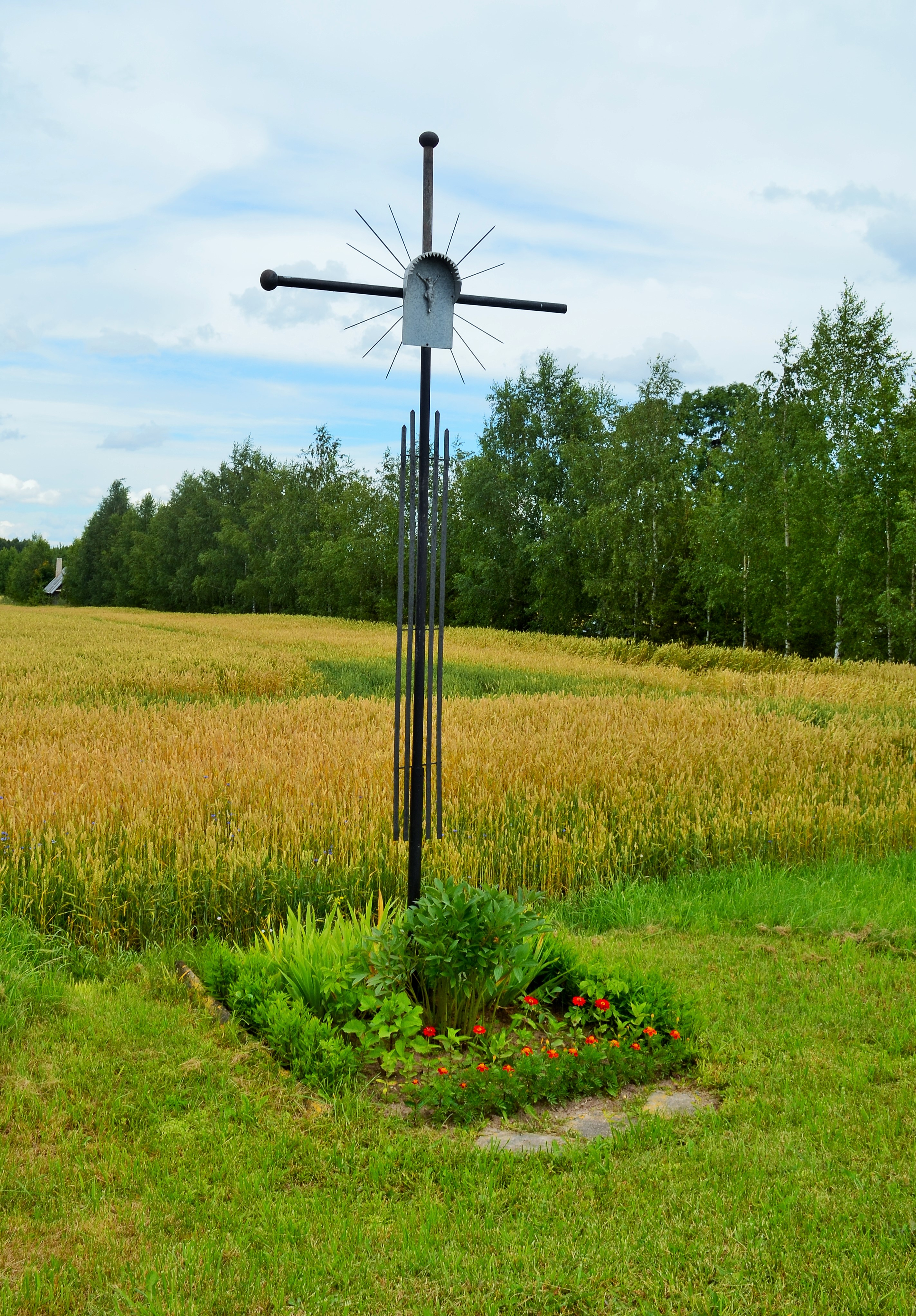 Kryžius Jurginuose, Ukmergės raj.